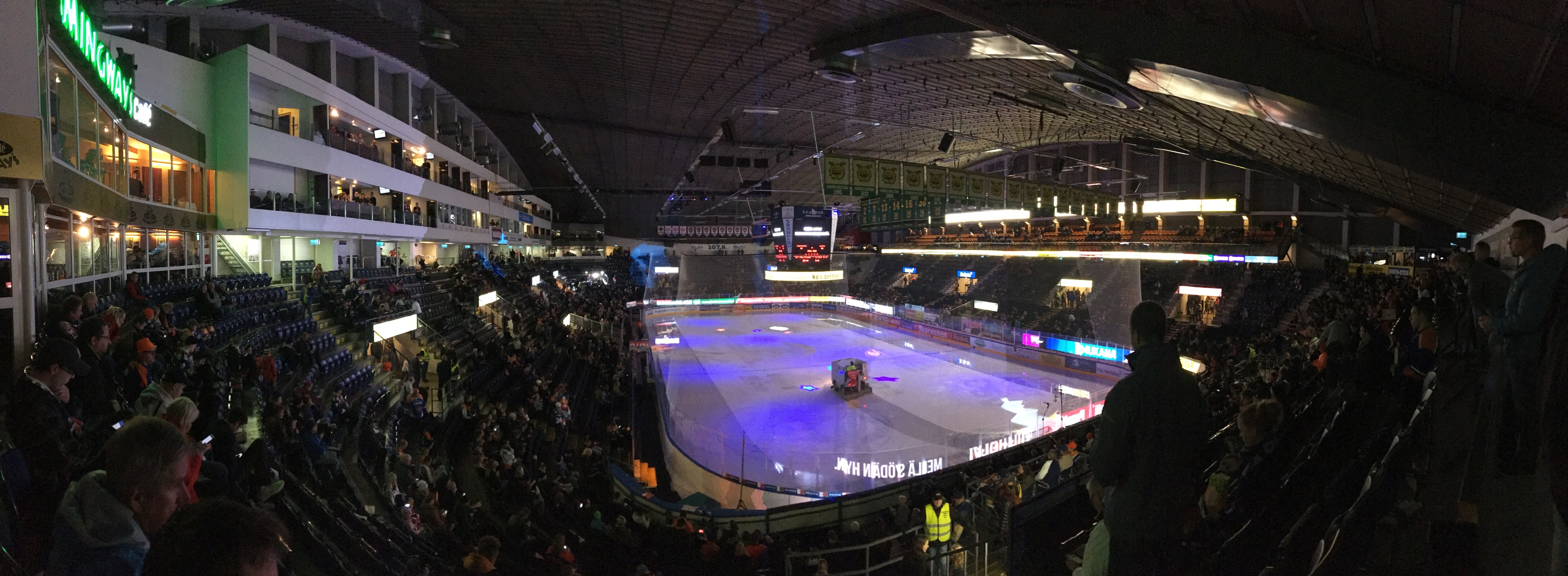 Tampereen jäähallissa (Hakametsän hallissa) otettu panoraamakuva 29. lokakuuta 2016 ottelussa Tappara-HIFK.